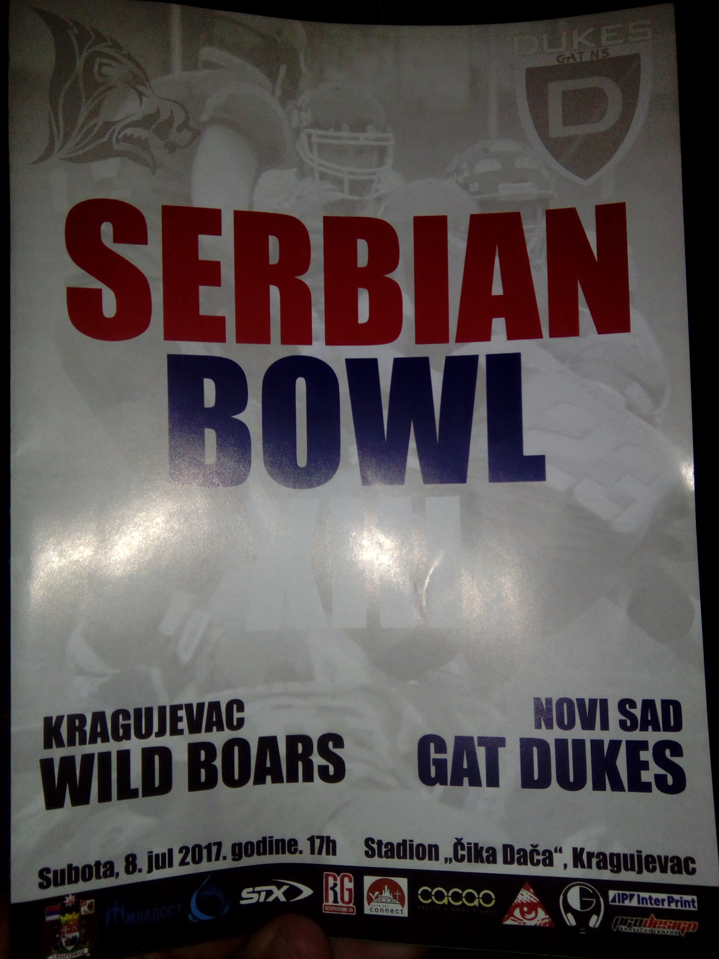 Srpski (latinica): Najava XIII srpskog super boula